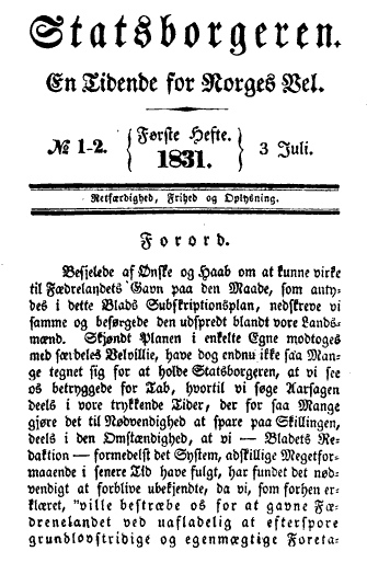 Forsiden av den norske avisa «Statsborgeren» 3. juli 1831.